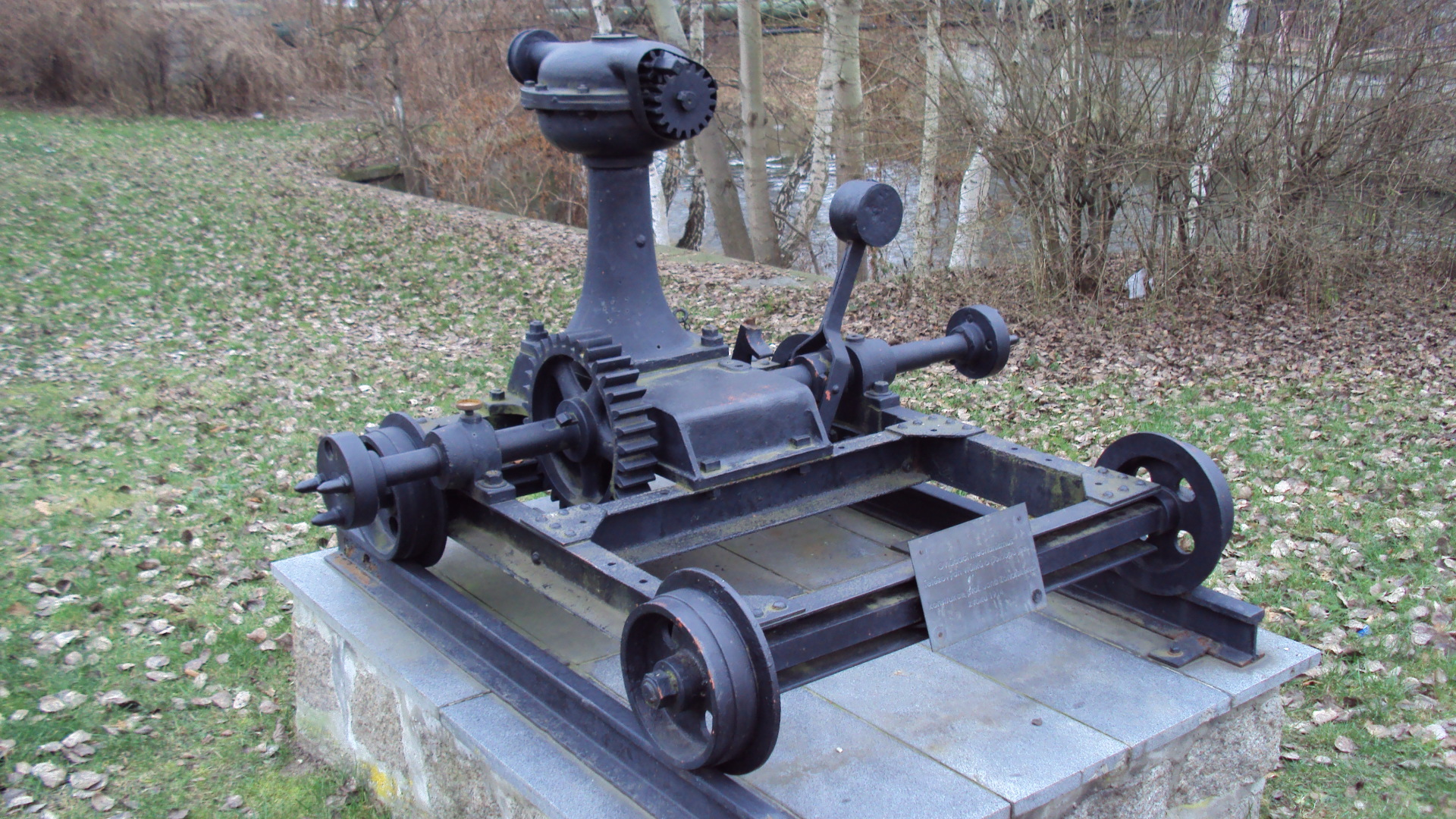 Mostní mechanismus vedle poklopového mostu přes Ploučnici v České Lípě